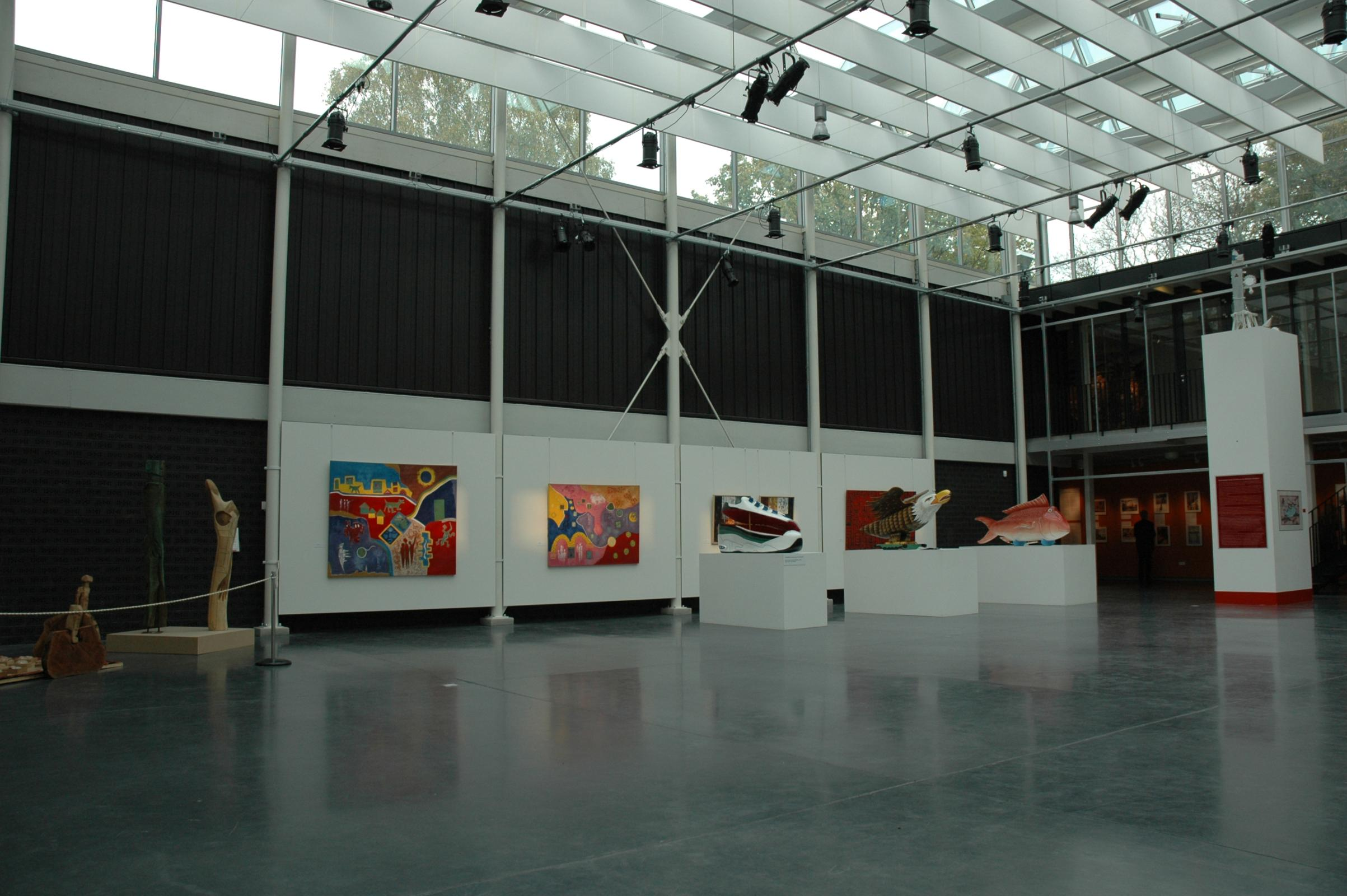 Zicht op een deel van het interieur van het Afrika museum in Berg en Dal